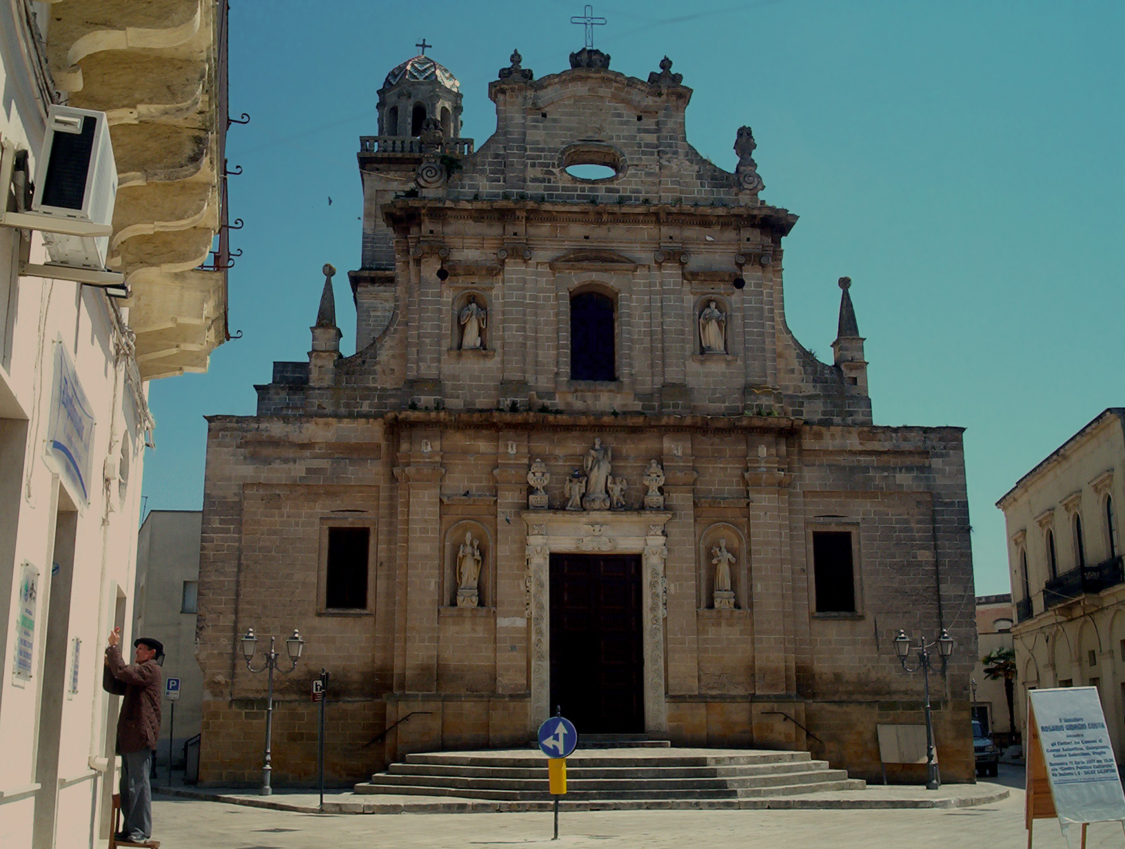 Chiesa Madre di Salice Salentino (Lecce)